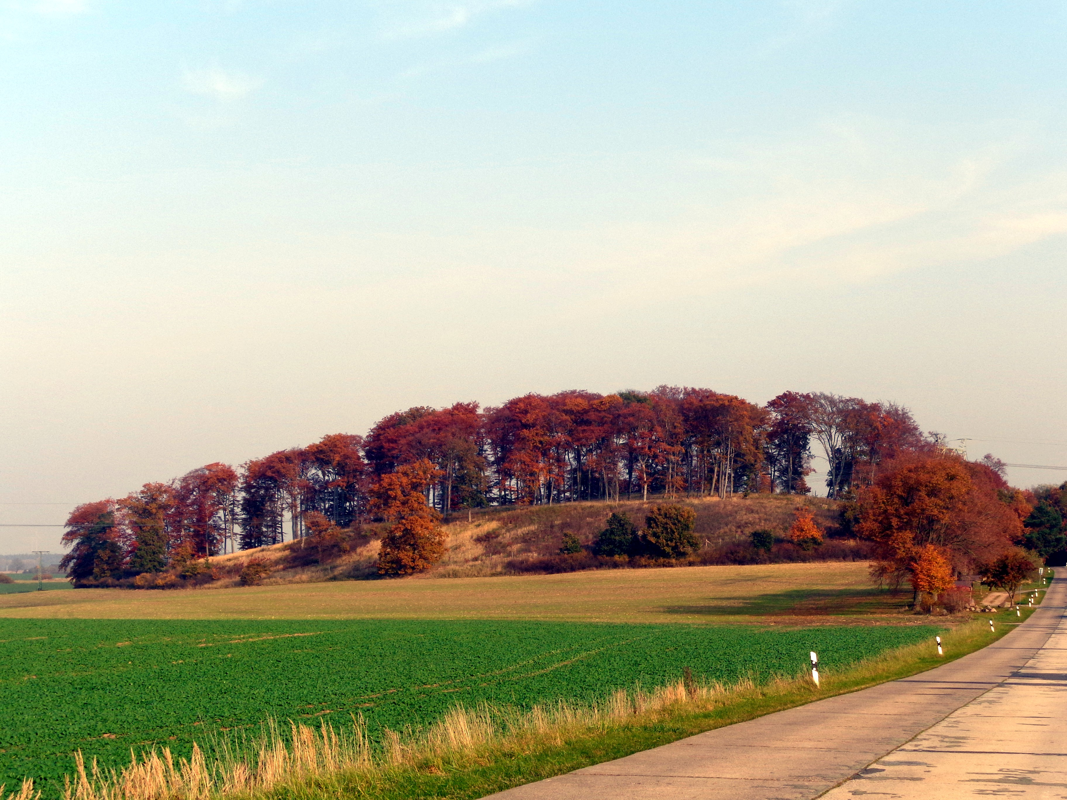 Endmoräne bei Schwiggerow, nördlich von Hoppenrade